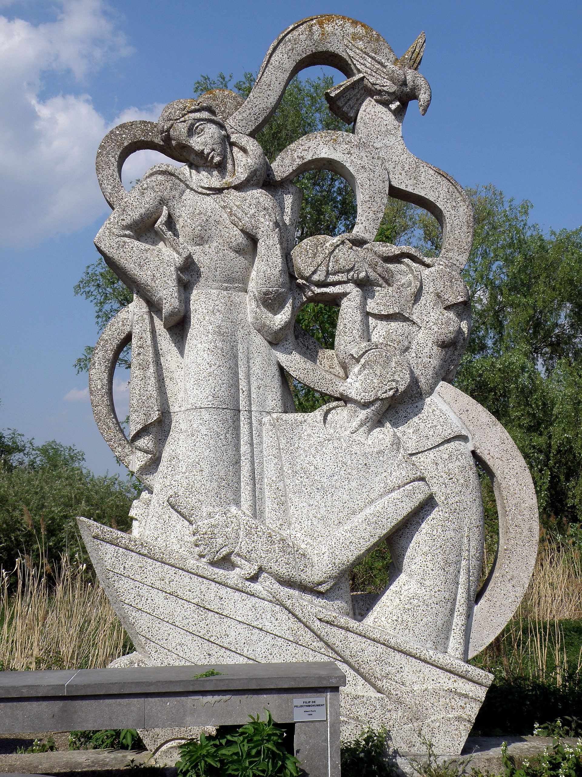 Hamme (Oost-Vlaanderen, België). Monument aan Hams schrijver Filip de Pillecyn, op de Scheldedijk nabij gehucht Driegoten, aan samenvloeiing van Schelde en Durme. Beeldhouwer Albert Poels.